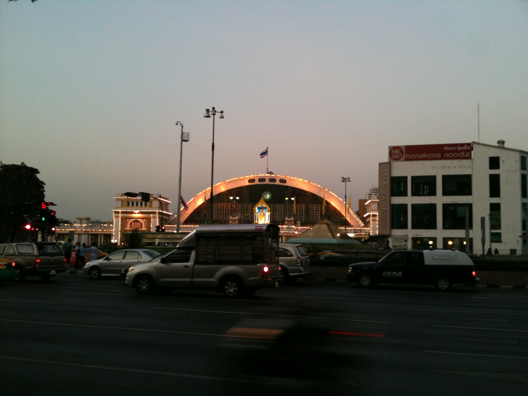 สถานีรถไฟหัวลำโพง